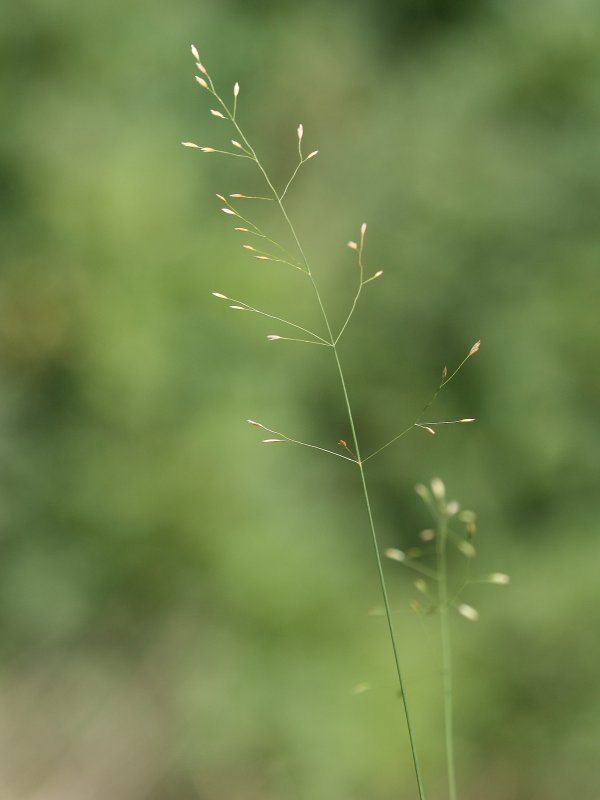 Sumpf-Rispengras (Poa palustris)